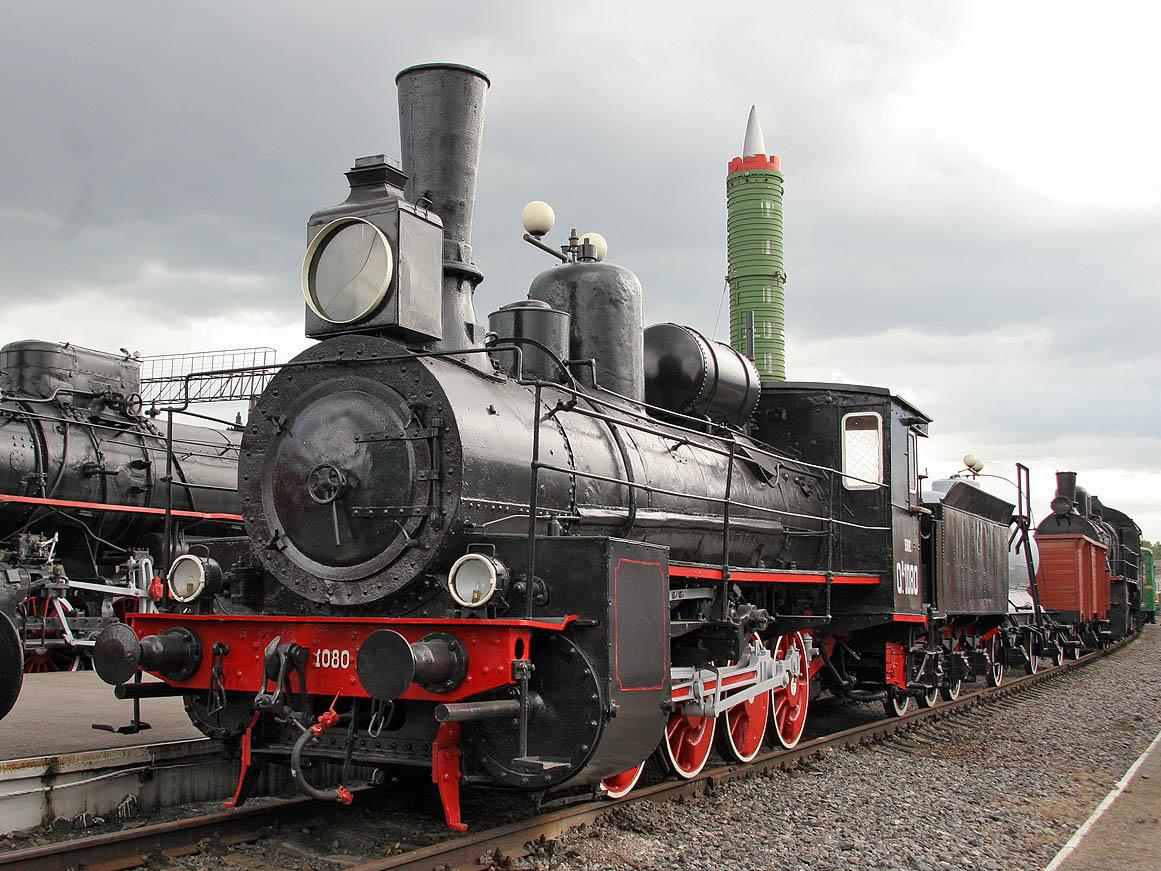 Паровоз Од-1080 в музее на Варшавском вокзале